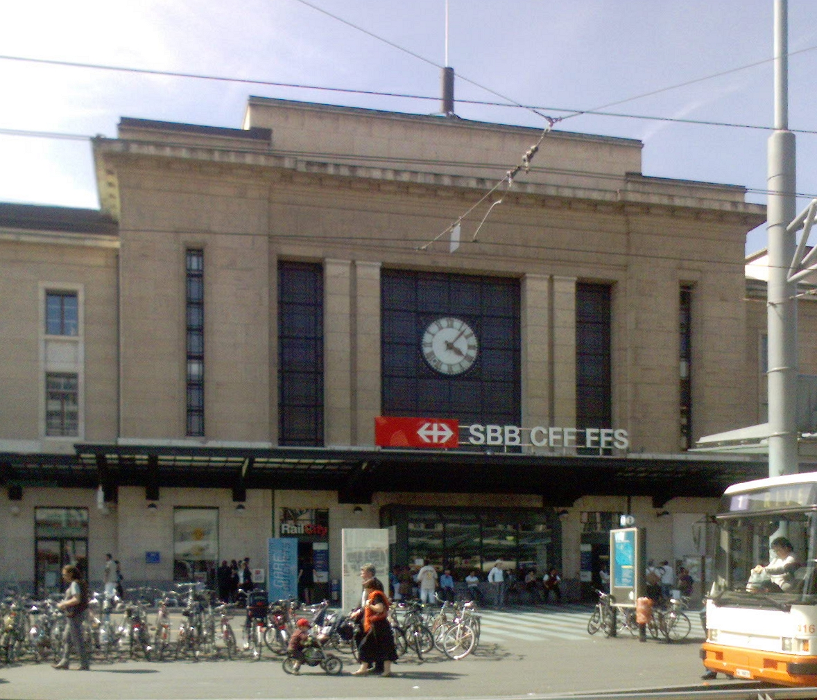 Gare Cornavin à Genève (Suisse)